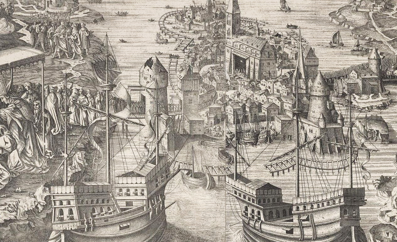 Ausschnitt einer Ansicht der Stadt Stockholm mit den Ereignissen von 1520, im Vordergrund die von Admiral Sören Norby befehligte dänische Flotte Christians II. (Stich nach einem verschollenen Holzschnitt von 1520)